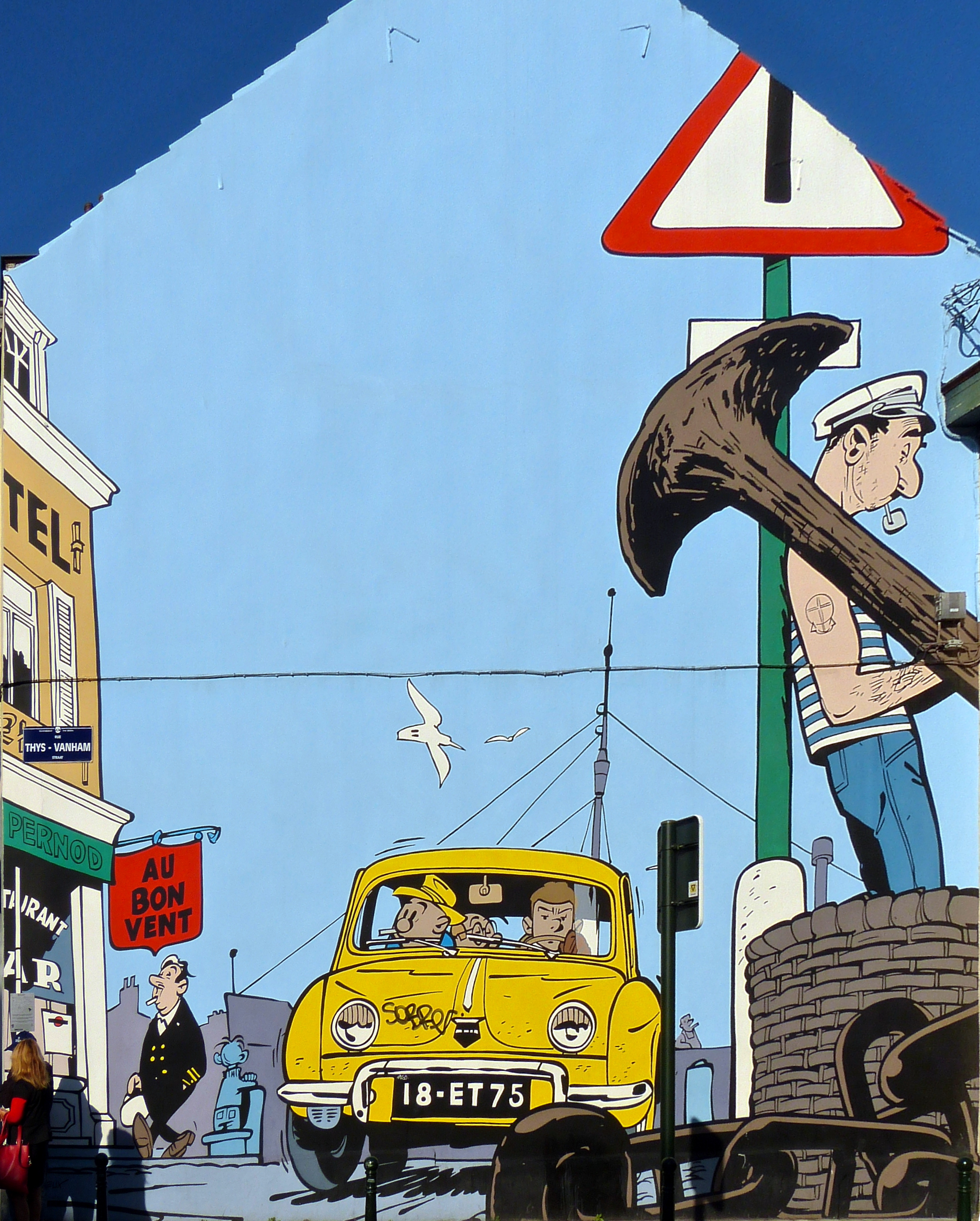 Gil Jourdan, tiré de l'album Les Cargos du crépuscule